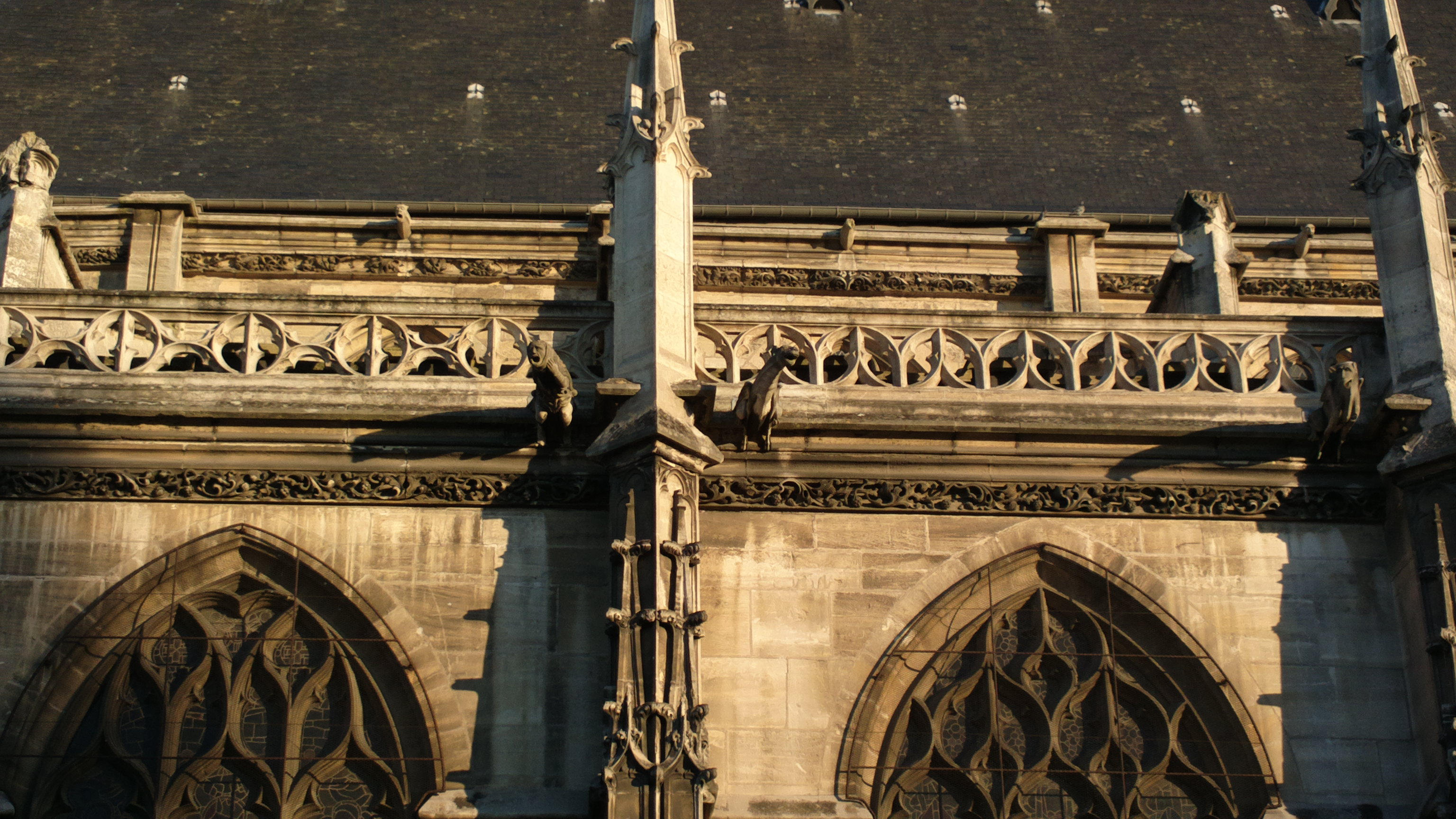 La collégiale Notre-Dame de Poissy est une église construite à partir du XIIe siècle, située à Poissy dans les Yvelines en France. .